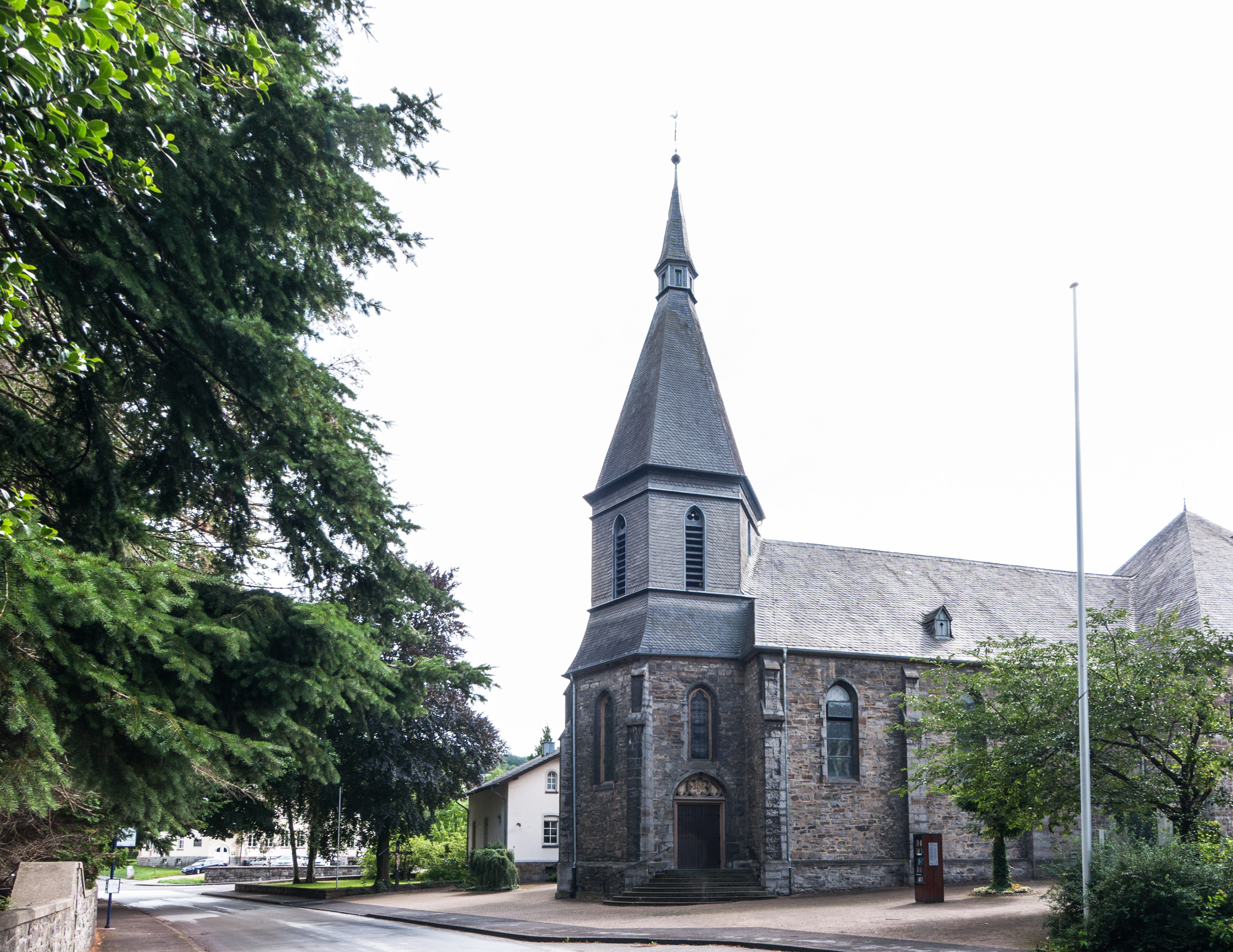 Arnsberg-Herdringen; kath. Kirche St. Antonius und St. Vitus